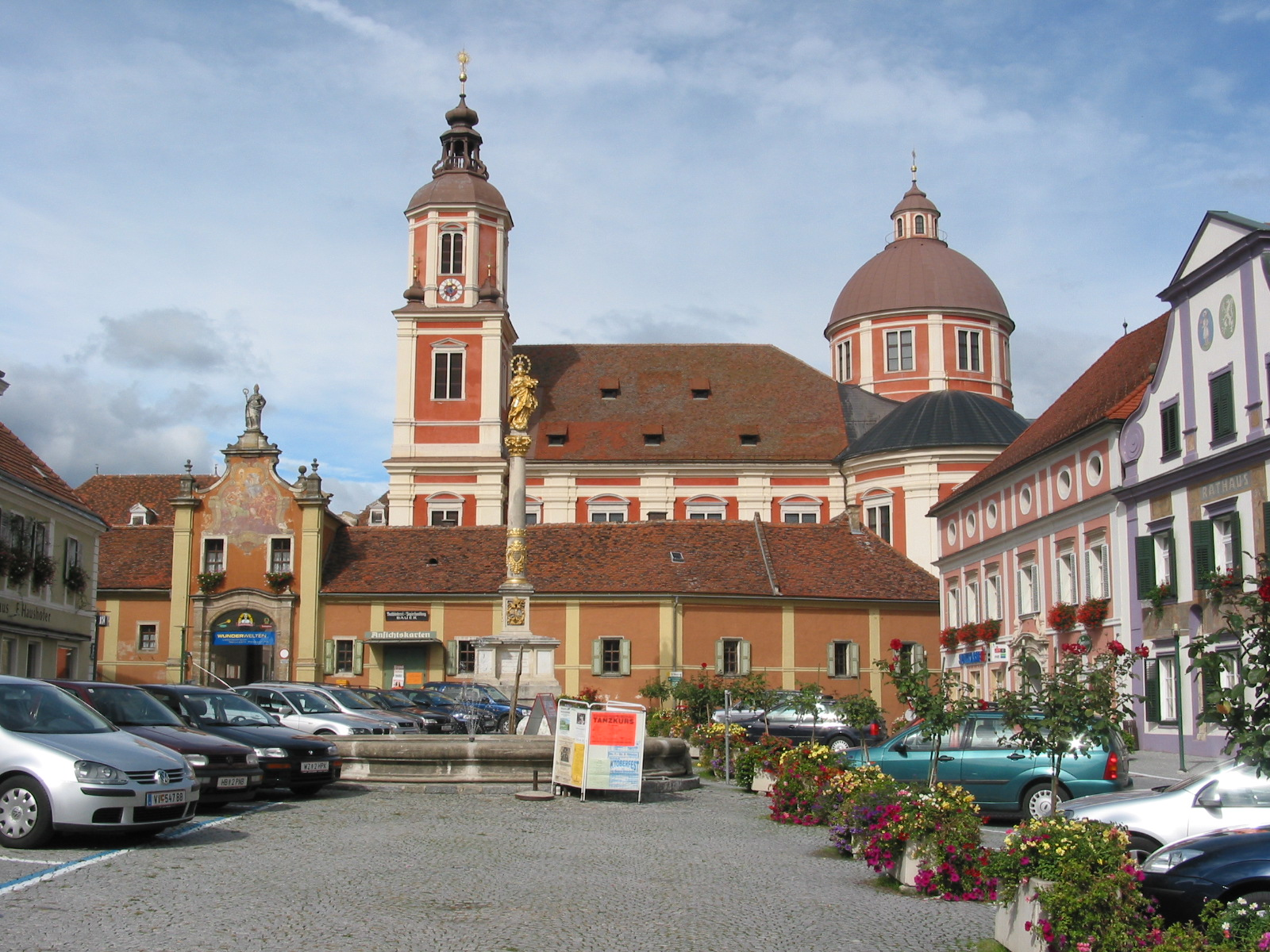 de: Hauptplatz von Pöllau en: Main square of Pöllau